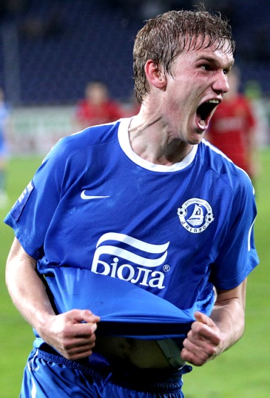 Александр Гладкий